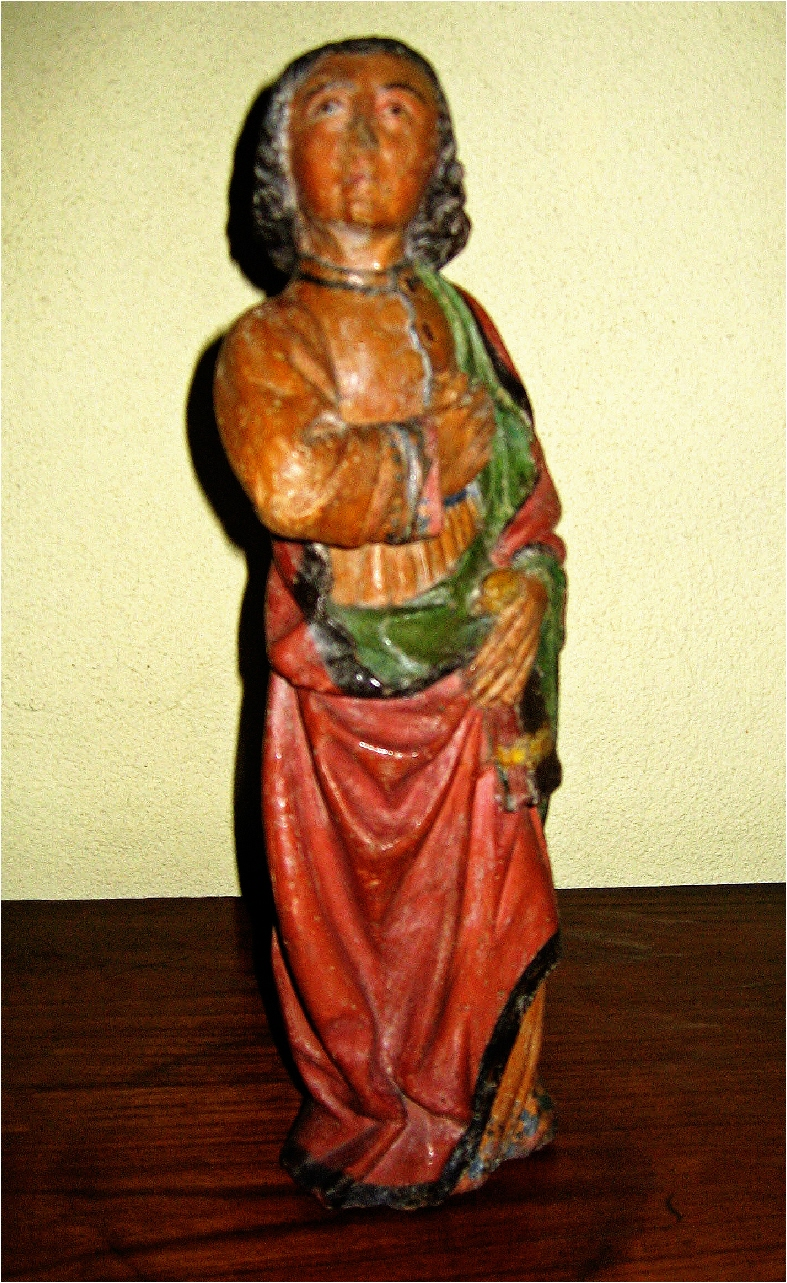 Statuette bois